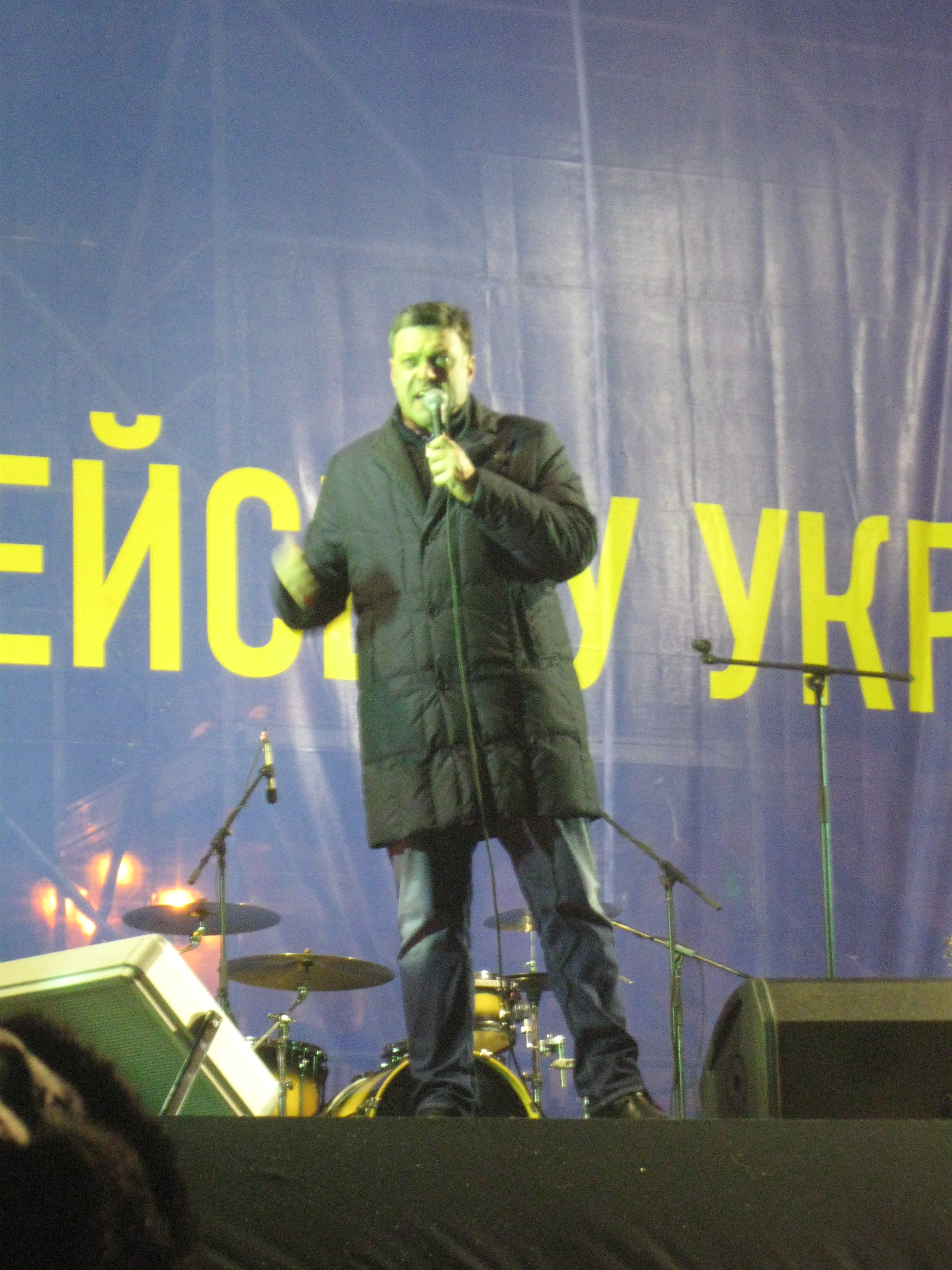 Євромайдан у Києві